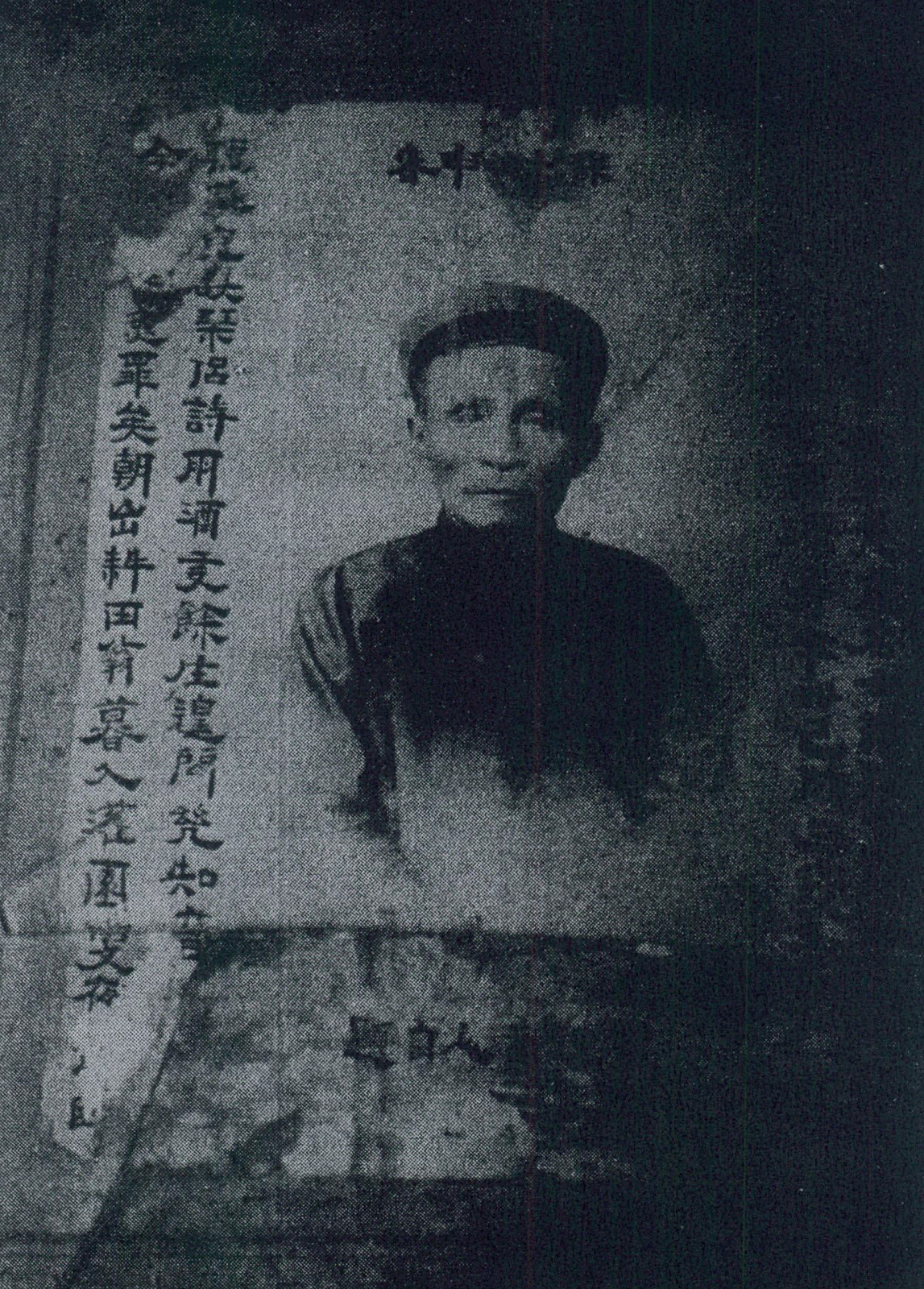 Hồ Sĩ Tạo (sinh năm 1869-?), quê làng Hòa Cư, huyện An Nhơn, đỗ cử nhân khoa Tân Mão (1891), mãi đến 13 năm sau, tức năm 36 tuổi khoa Giáp Thìn, năm Thành Thái thứ 16 (1904) mới đỗ tiến sĩ.